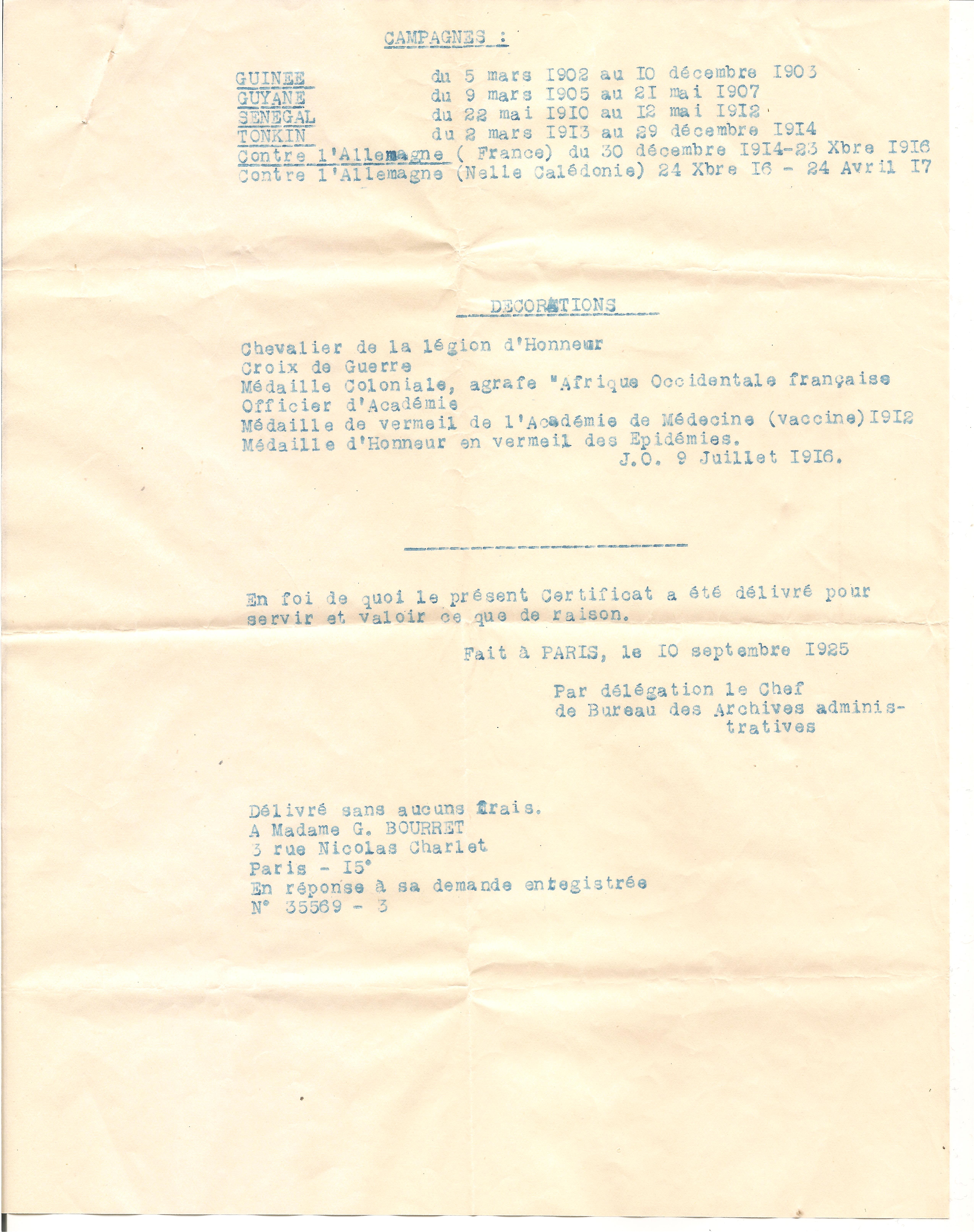 Certificat des états de service de Gaston Bourret - 2e partie